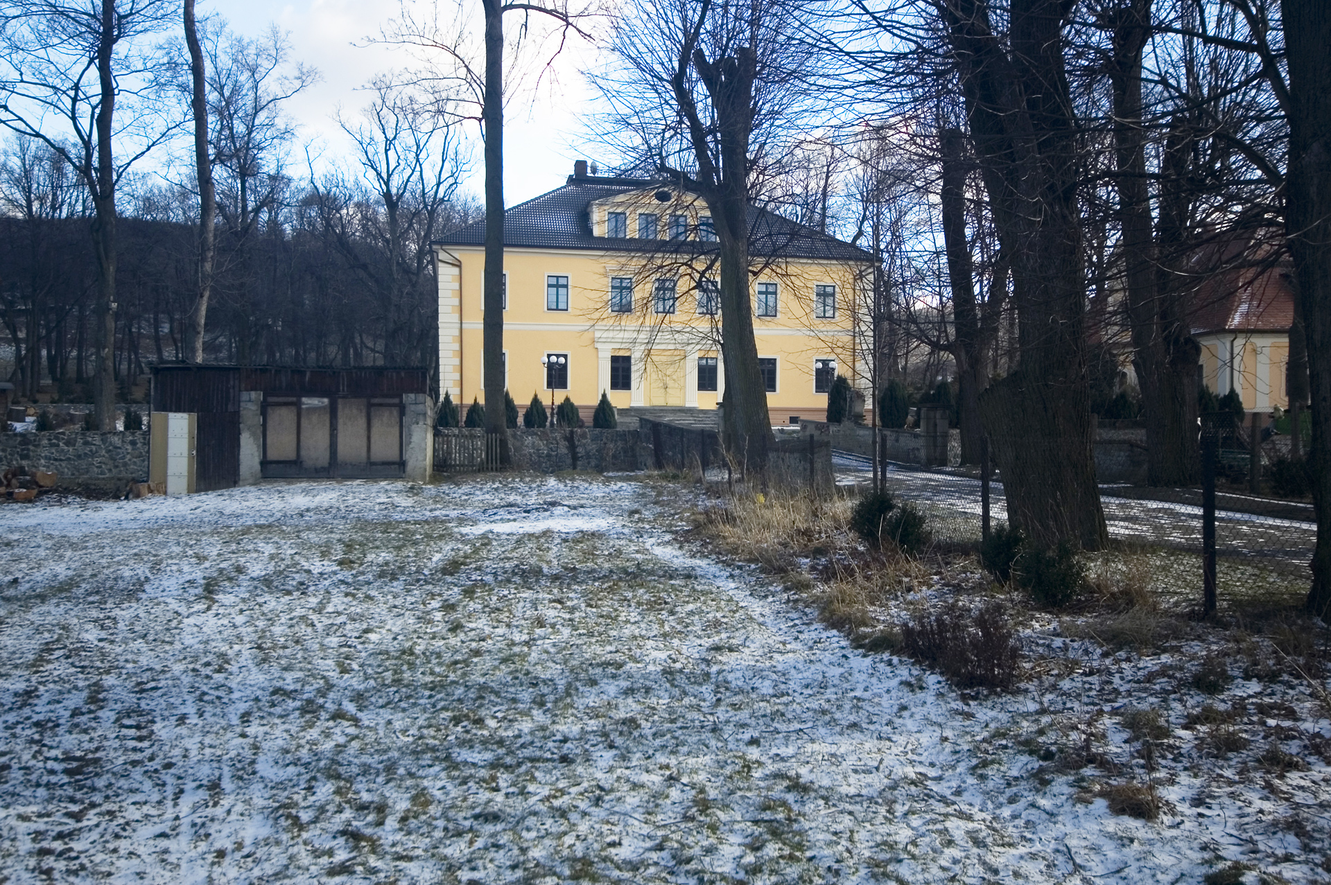 Jarnołtówek - zespół dworski, XVI-XIX: - dwór, - oficyna, - parkzabytek nr 933/64 z 3.06.1964)